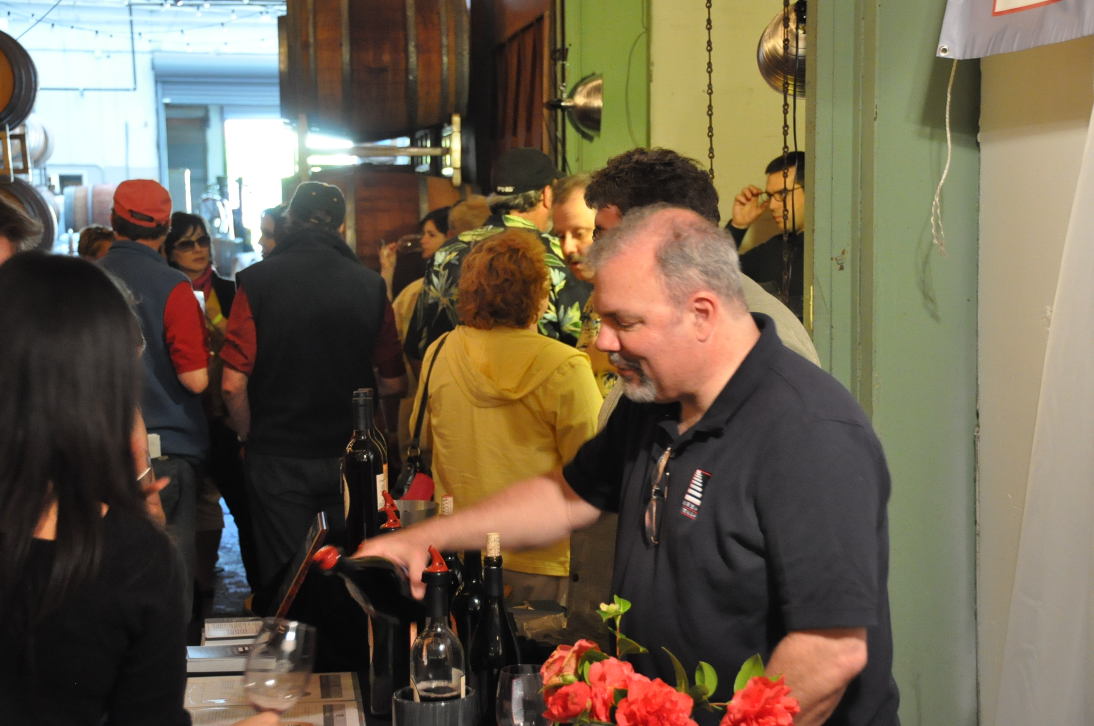 Dégustation à Urbano Cellars lors de la EBVA passport 2009